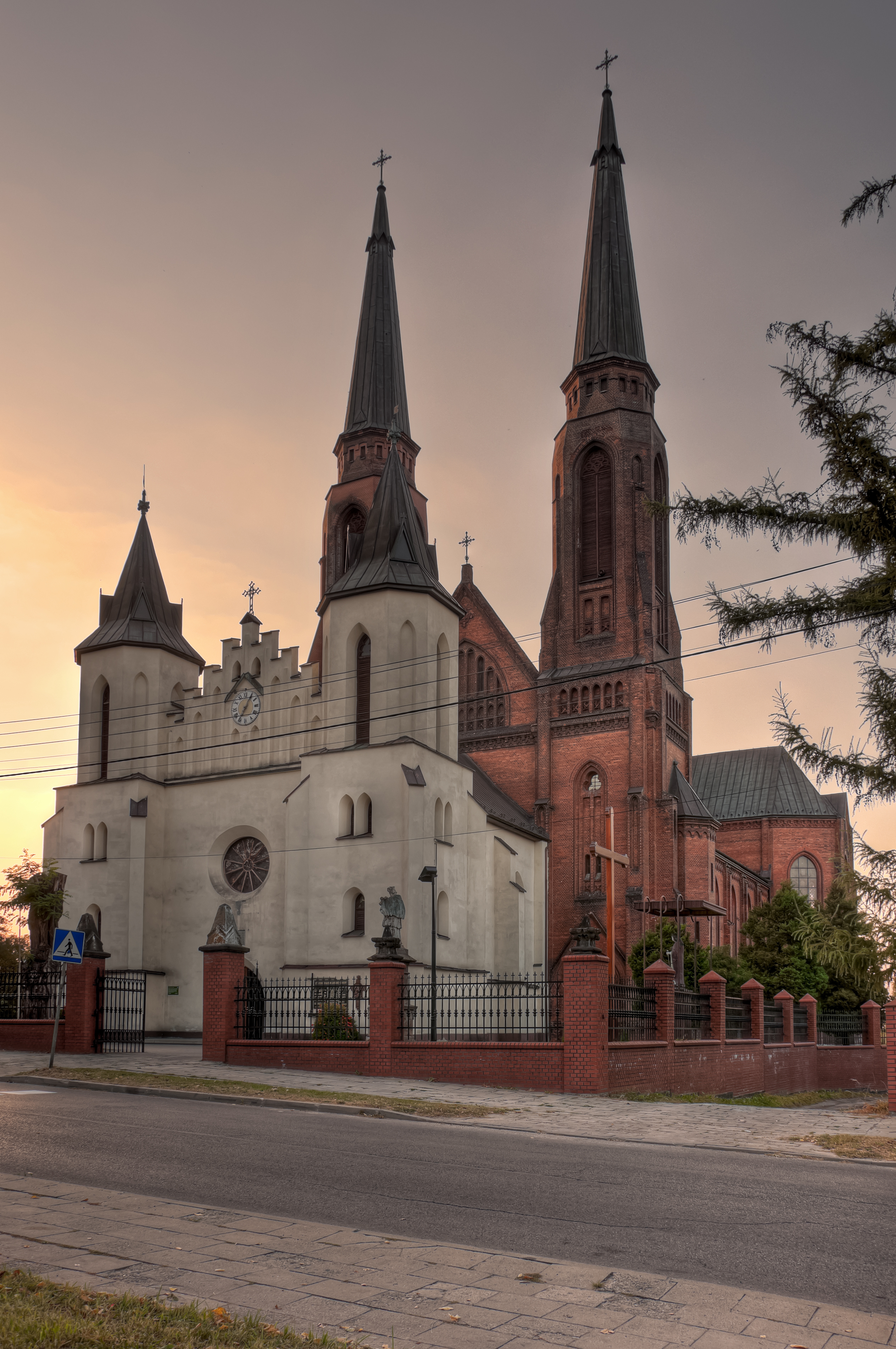 Kościół p.w. św. Joachima, Sosnowiec - A-18/60 z 23.02.1960 i A/166/06 z 11.01.2006